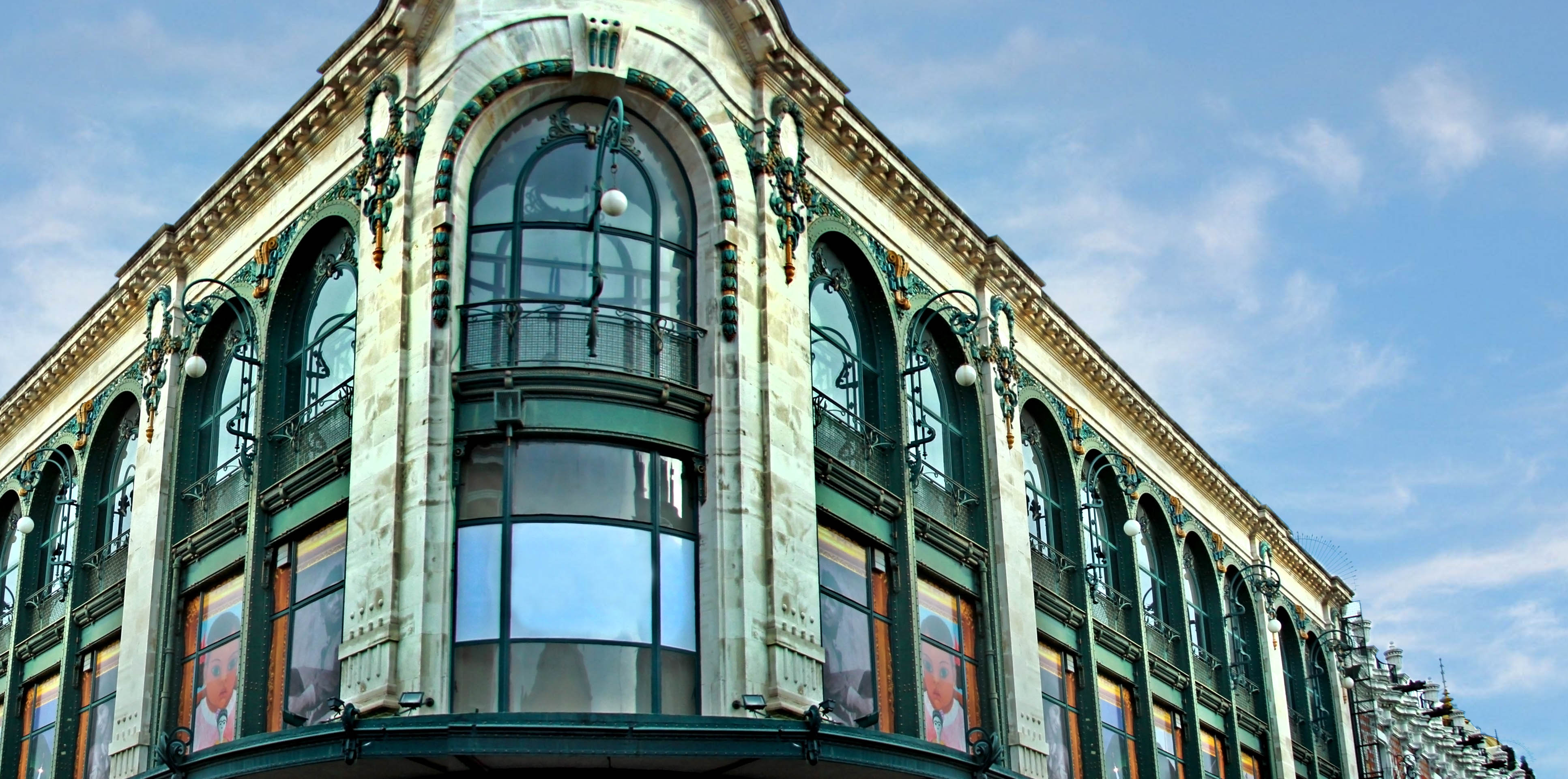 Esquina de la 2 Oriente y 2 Norte donde se ubica Capilla del Arte de la UDLAP — en la Ciudad de Puebla, del estado de Puebla, México.